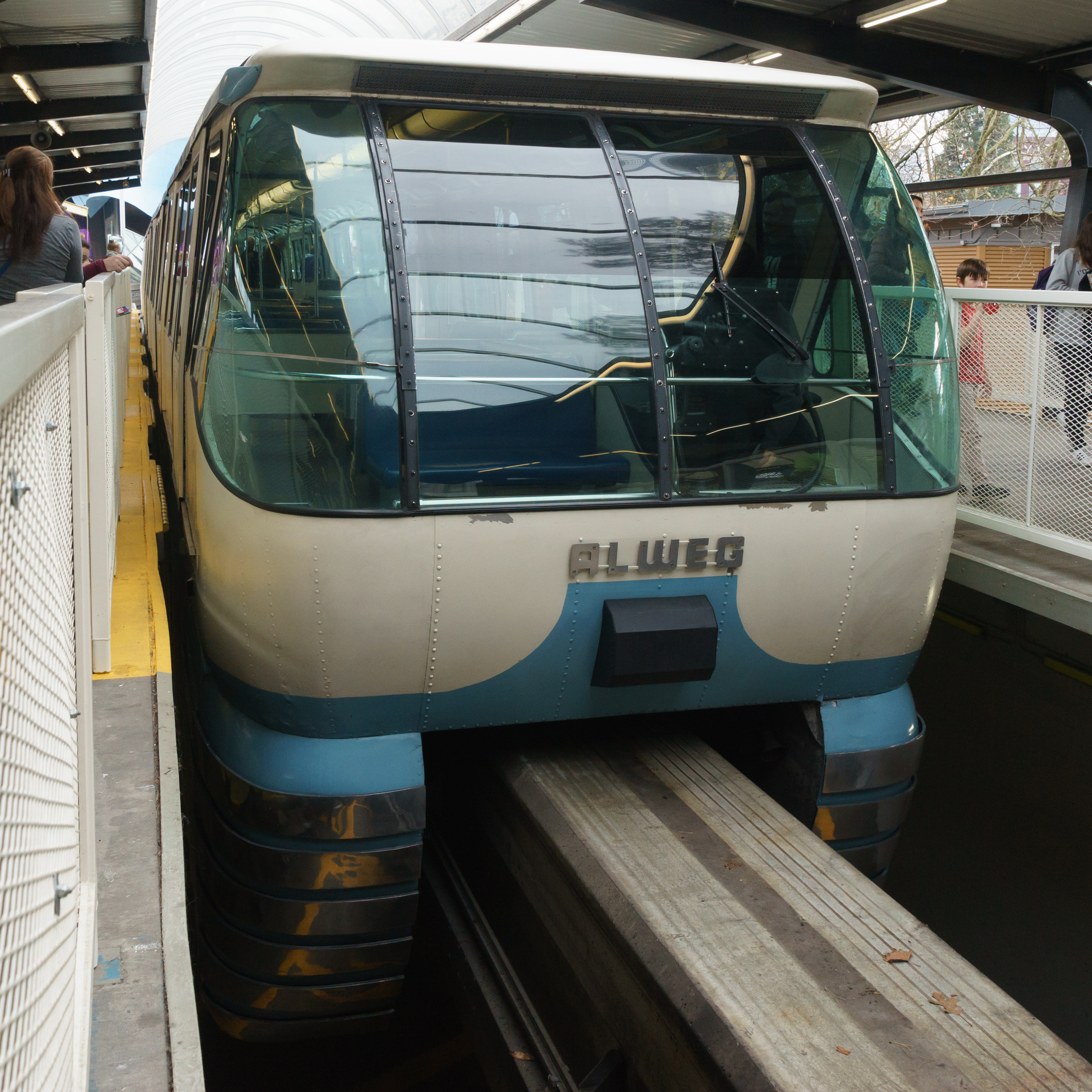 Der blaue Zug des Seattle Monorails in der Station an der Space Needle.